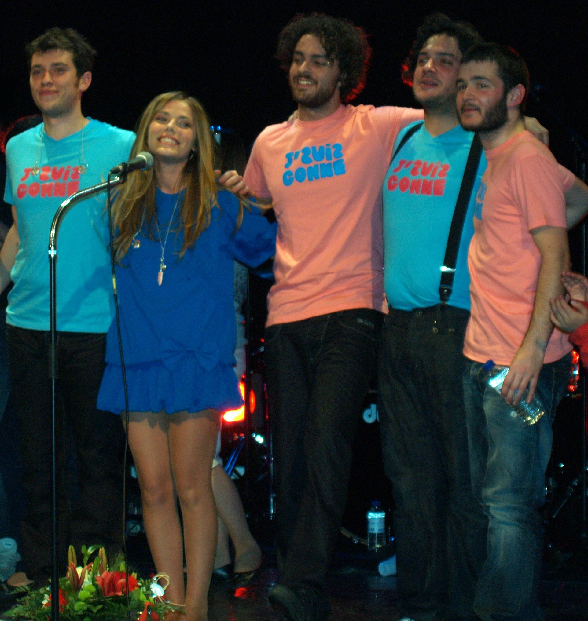 Emma Daumas et ces musiciens en fin de concert à Saint-Martin de Crau le 21 mars 2009